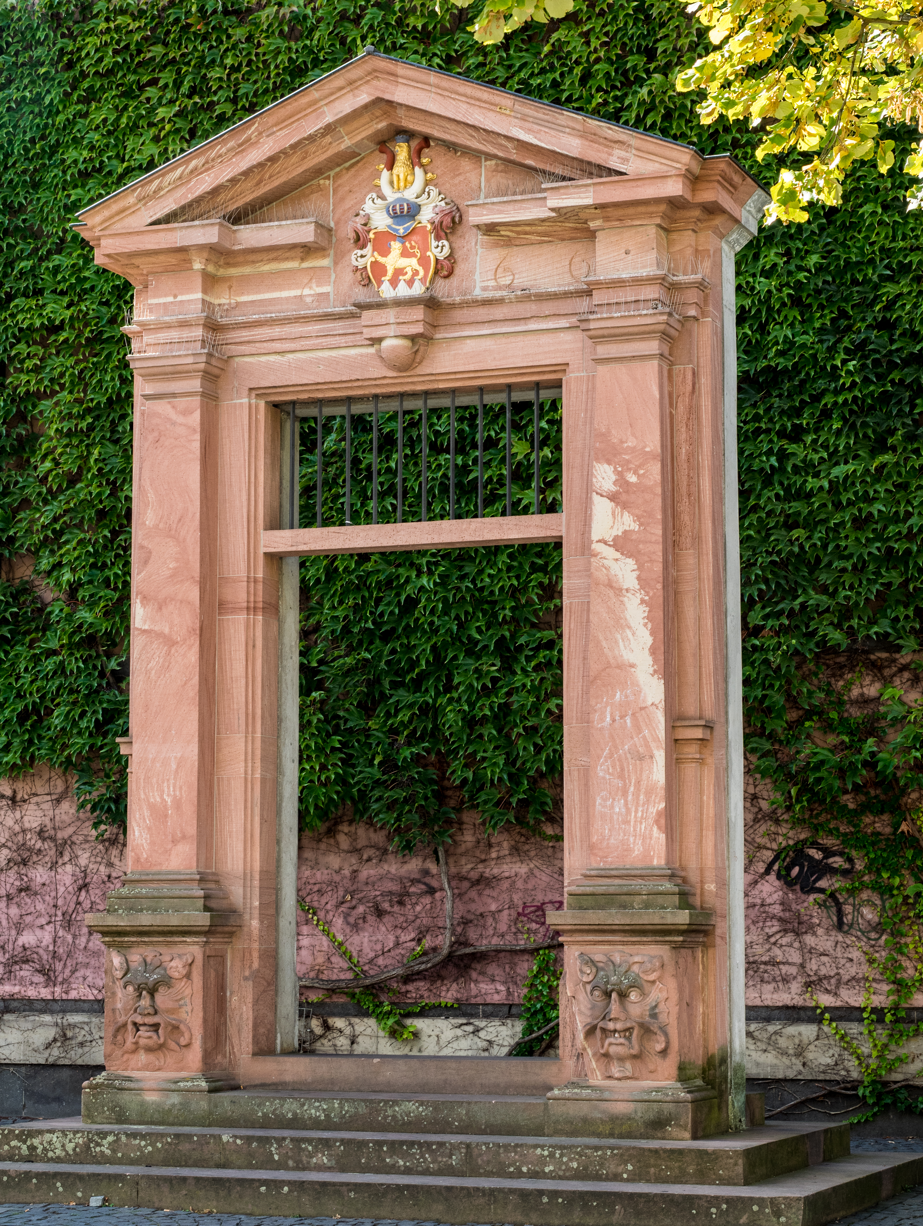 Gartenportal des ehemaligen bischöflichen Palais in Mainz, laut Beschreibungstafel ursprünglich um 1666 gebaut, beim Abriss gerettet. Restaurierung durch Theo Ignaz Graffé; 1993 an dieser Stelle wieder aufgebaut. Mainz, Bischofsplatz